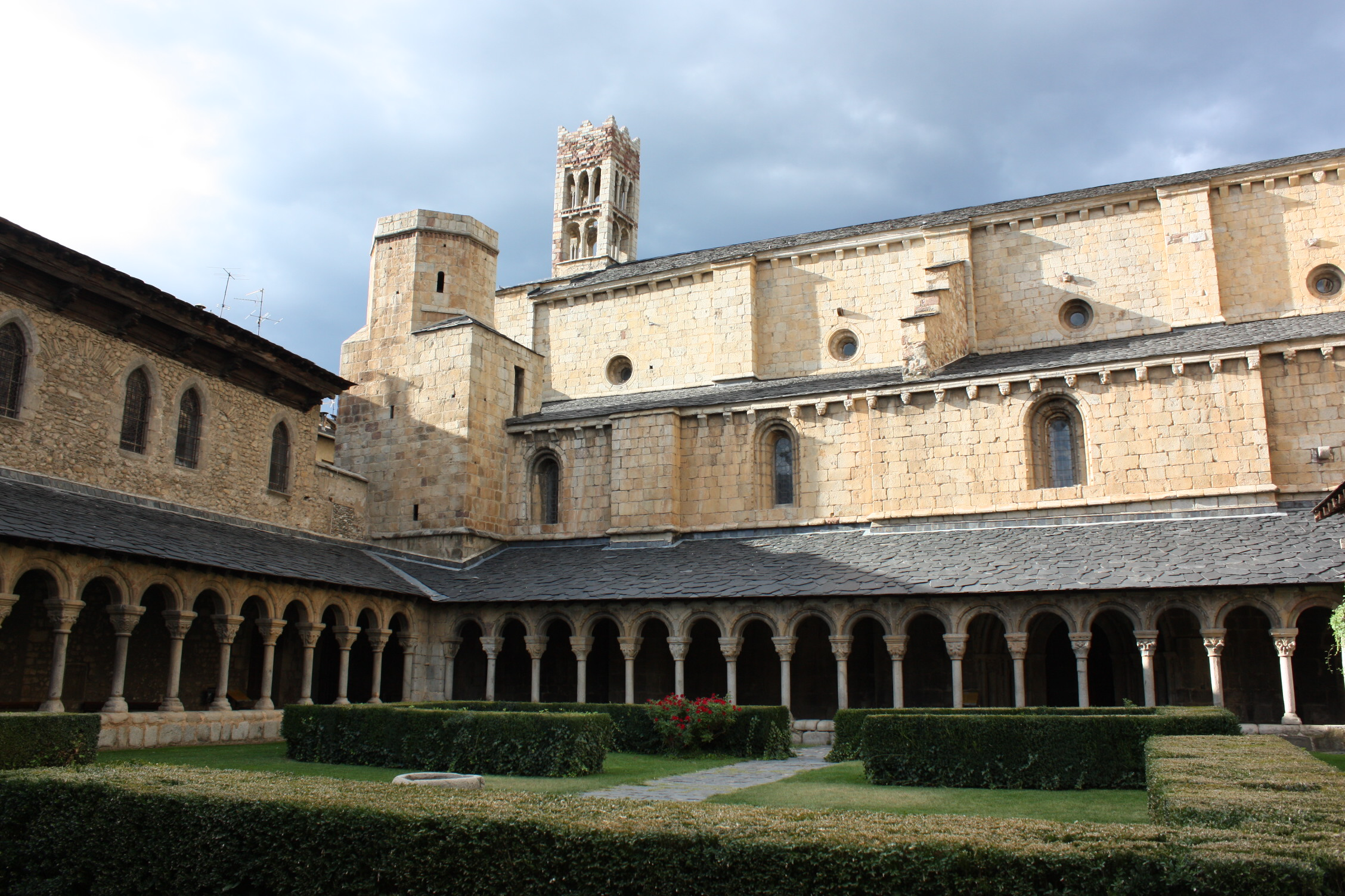 Claustre de la Catedral d'Urgell i la torre de la façana principal